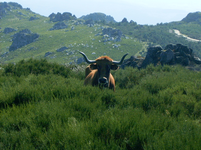 Category:Imaxes de Maceda (Original text : Vaca galega na Fonte do Santo (Serra do San Mamede)])